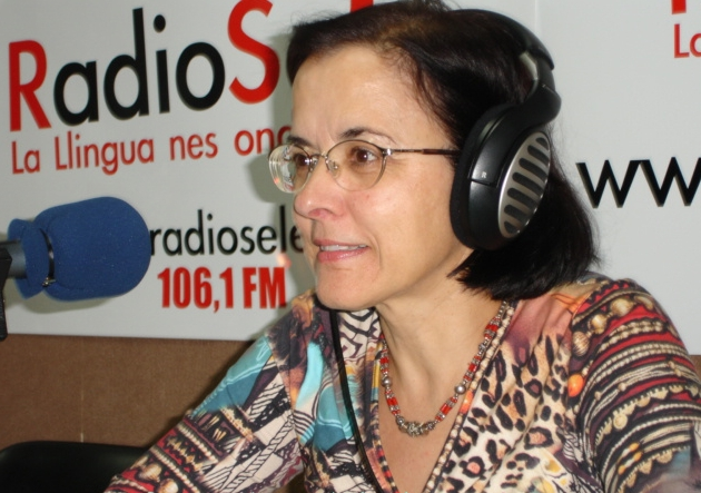 Ana Cano, presidenta de l'Academia de la Llingua Asturiana, nún programa de Radio Sele.